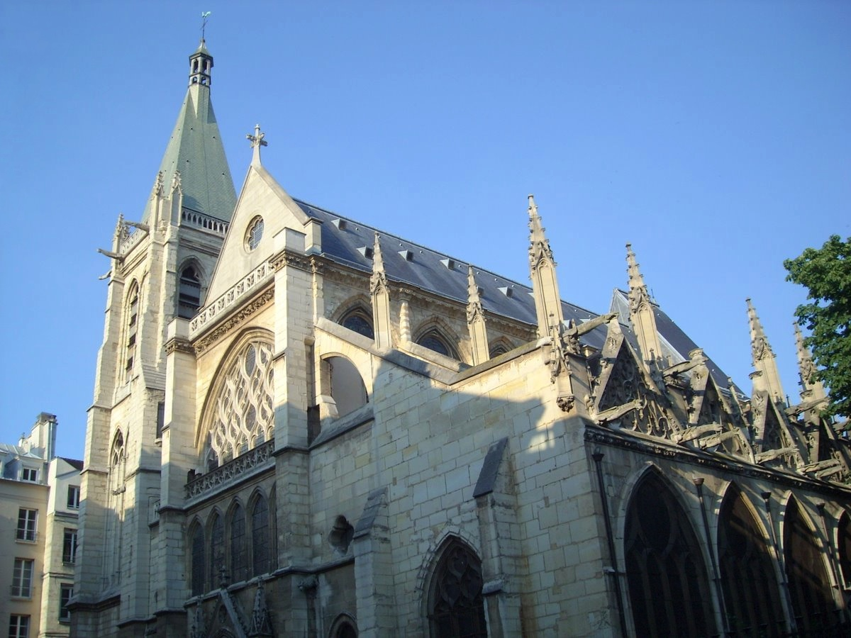 Façade ouest, clocher et arc-boutants de l'église Saint-Séverin